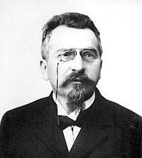 profesor Karel Jaroslav Maška